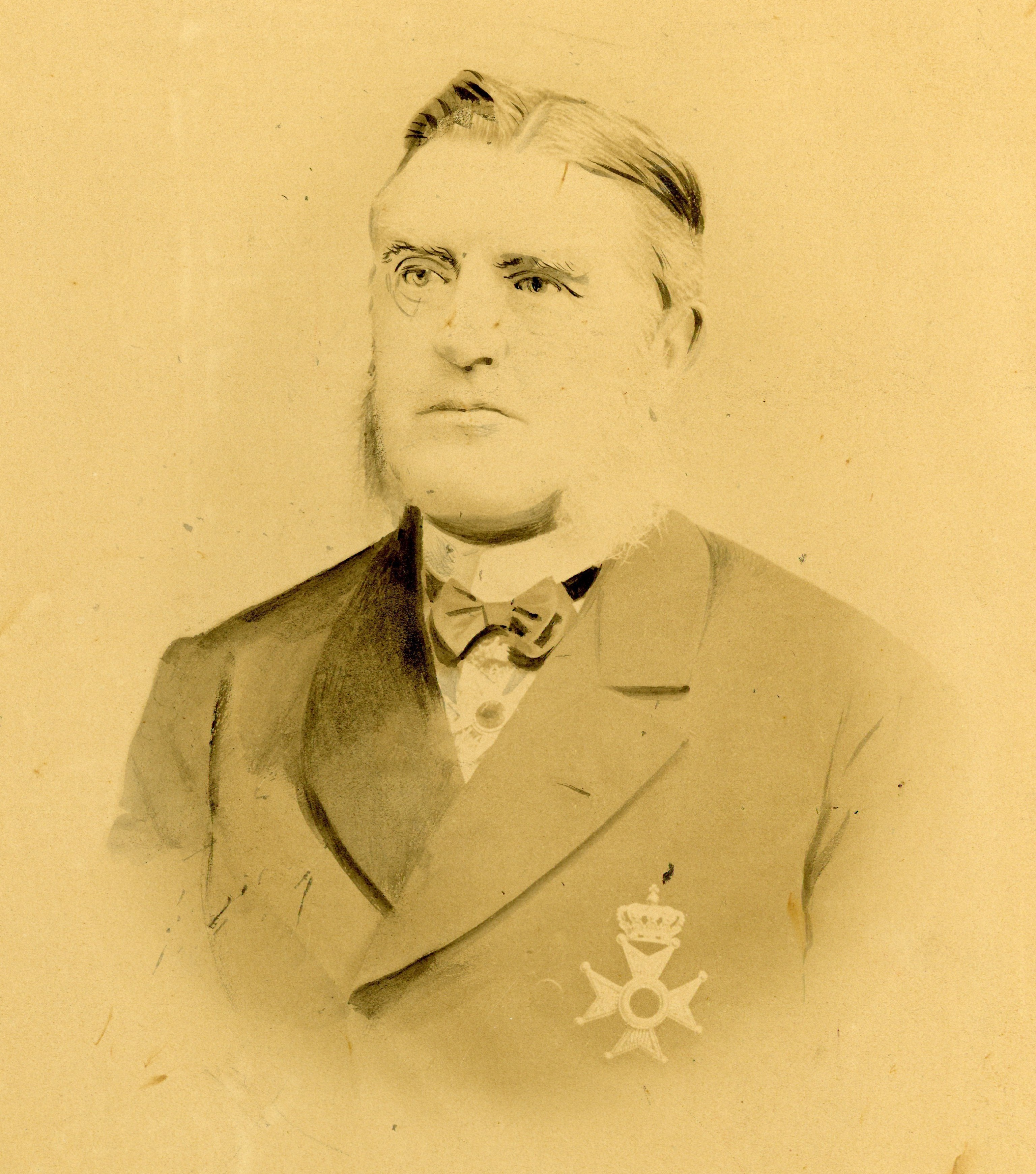 Willem Frederik van Erp Taalman Kip, minister van Marine van 16 mei 1874 tot 2 november 1877, van 20 augustus 1879 tot 22 april 1883 en van 19 april 1884 tot 4 augustus 1885 Collectie: Foto's Identificatienr.: 1.62273 Vervaardiger naam: [ onbekend ] Datering: ca. 1885 Opname Aantal: 1 Object: zwart-witfoto Afmetingen (h x b): 26 x 19 cm Aanwinstnummer: 1966/288 Druk: [ onbekend ] Afgebeelde persoon: Erp Taalman Kip, Willem Frederik van